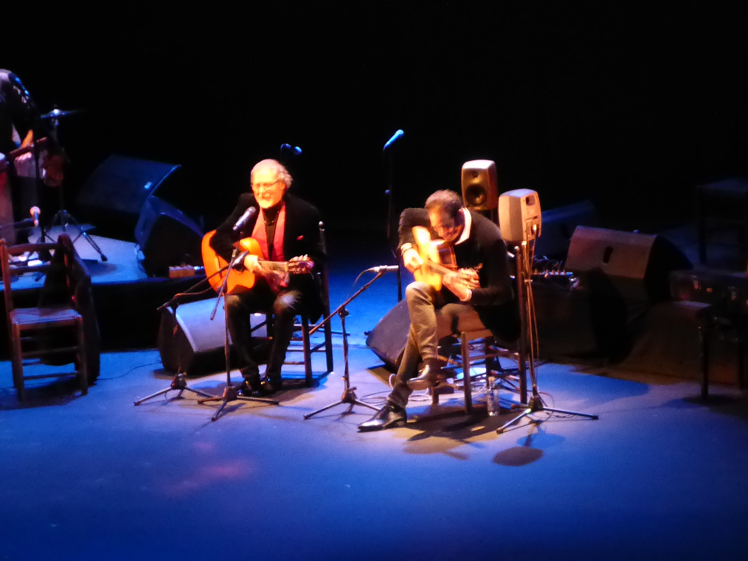 Diego Carrasco, concierto gira "No marrecojo", en el teatro Villamarta de Jerez de la Frontera (España), con Diego del Morao